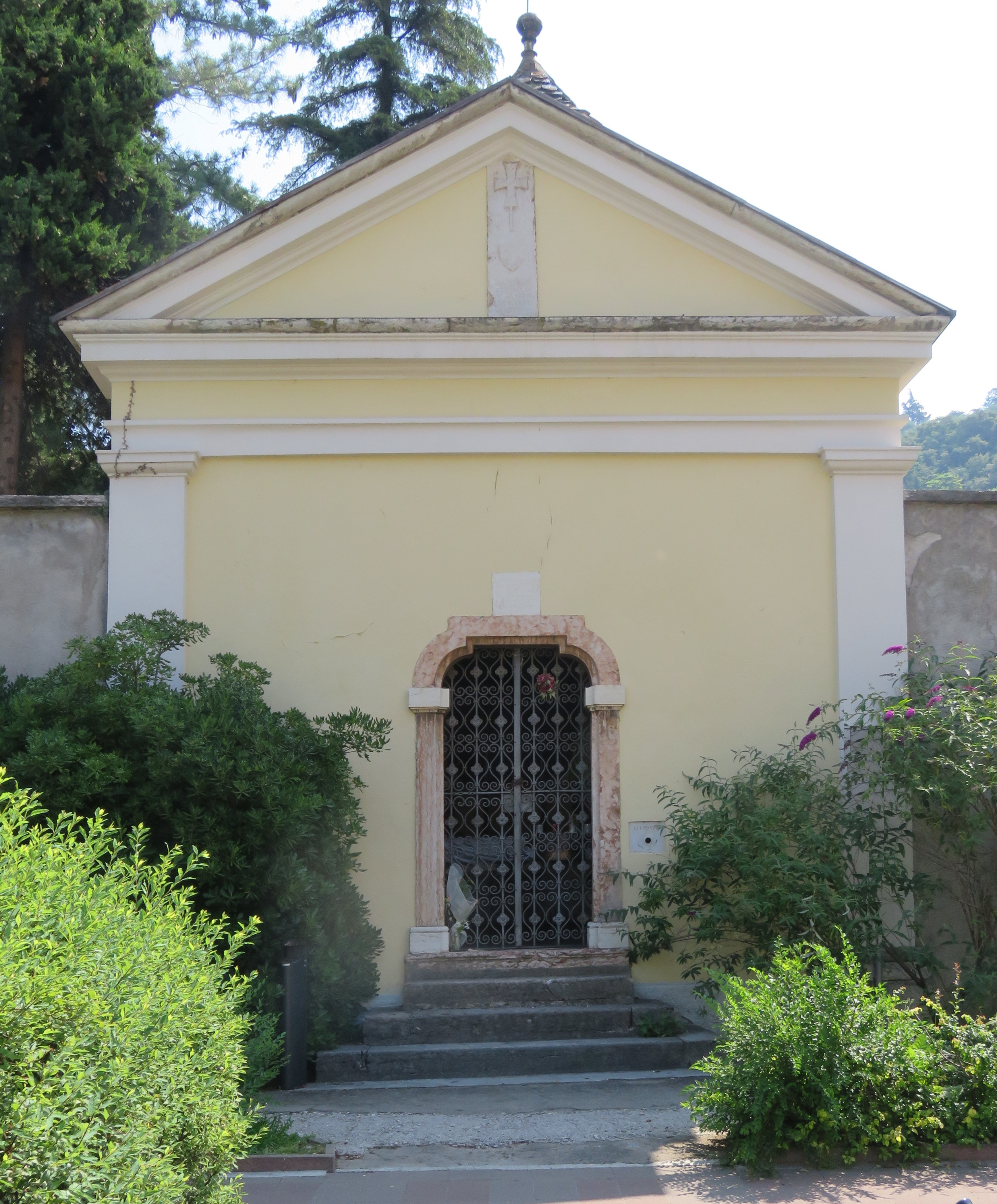 Facciata visibile da Corso Bettini, a breve distanza dal Mart e vicino alla Chiesa di San Rocco